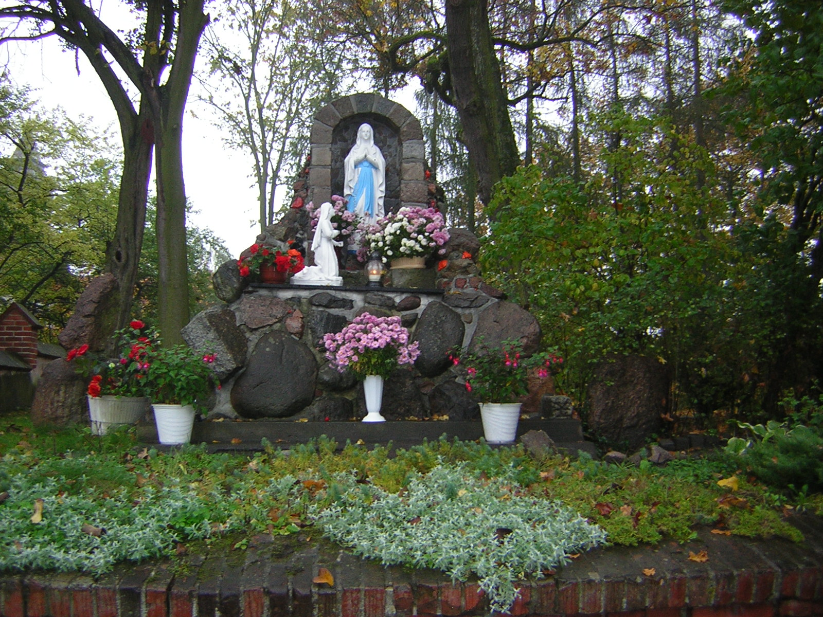 Kapliczka przy kościele p.w. Przemienienia Pańskiego w Iławie